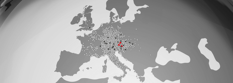 Die Internorm Vertriebspartner, Niederlassungen und Werke im Überblick.